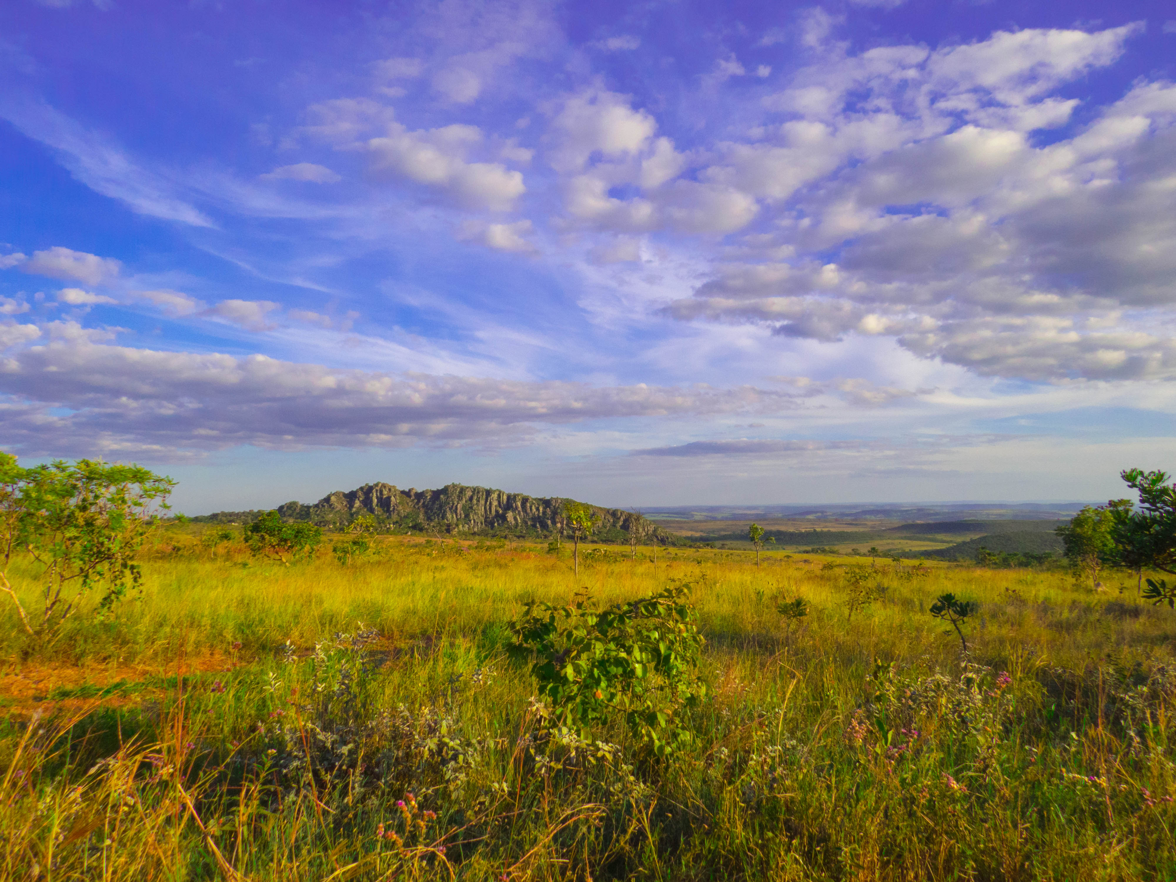 Parque Estadual dos Pireneus - Morro Cabeludo - Goiás - Brasil